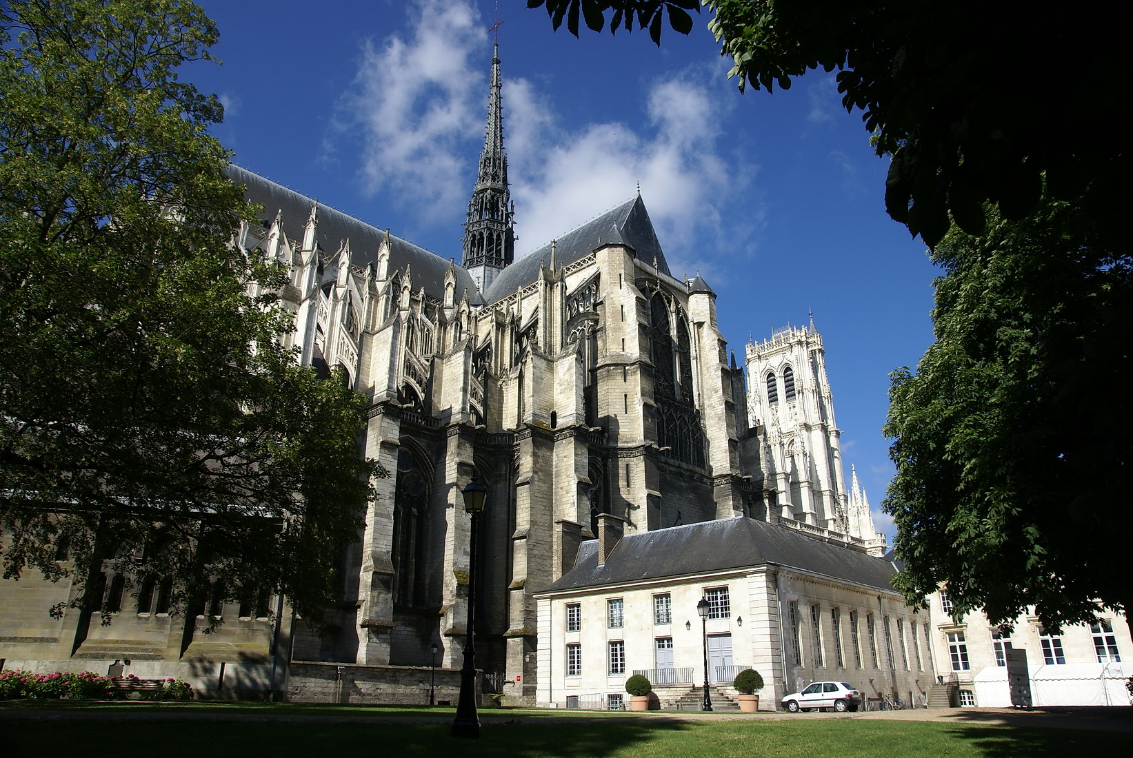 Cathédrale d'Amiens .